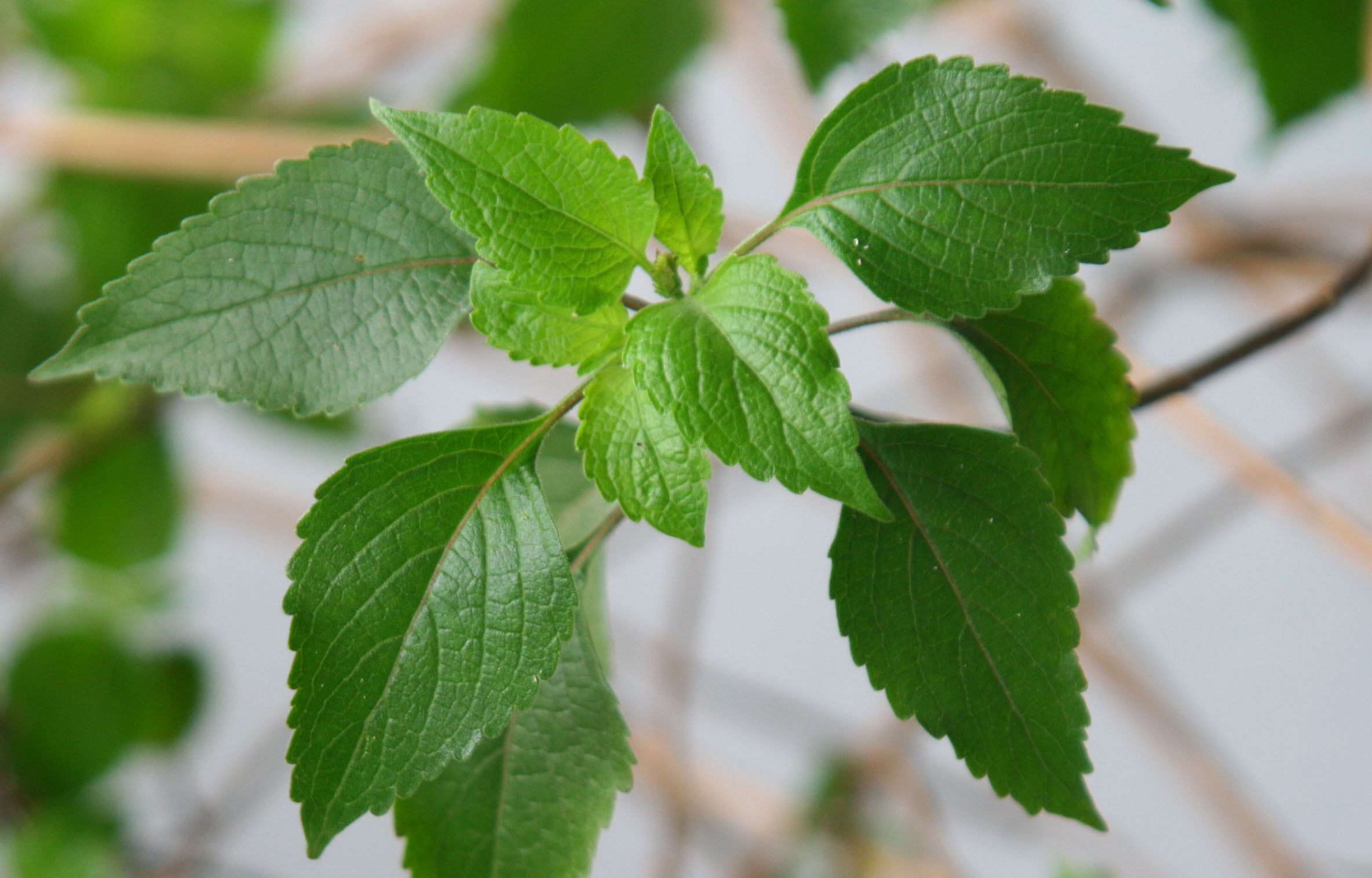 കാട്ടുതൃത്താവ് (Ocimum americanum or Ocimum canum )